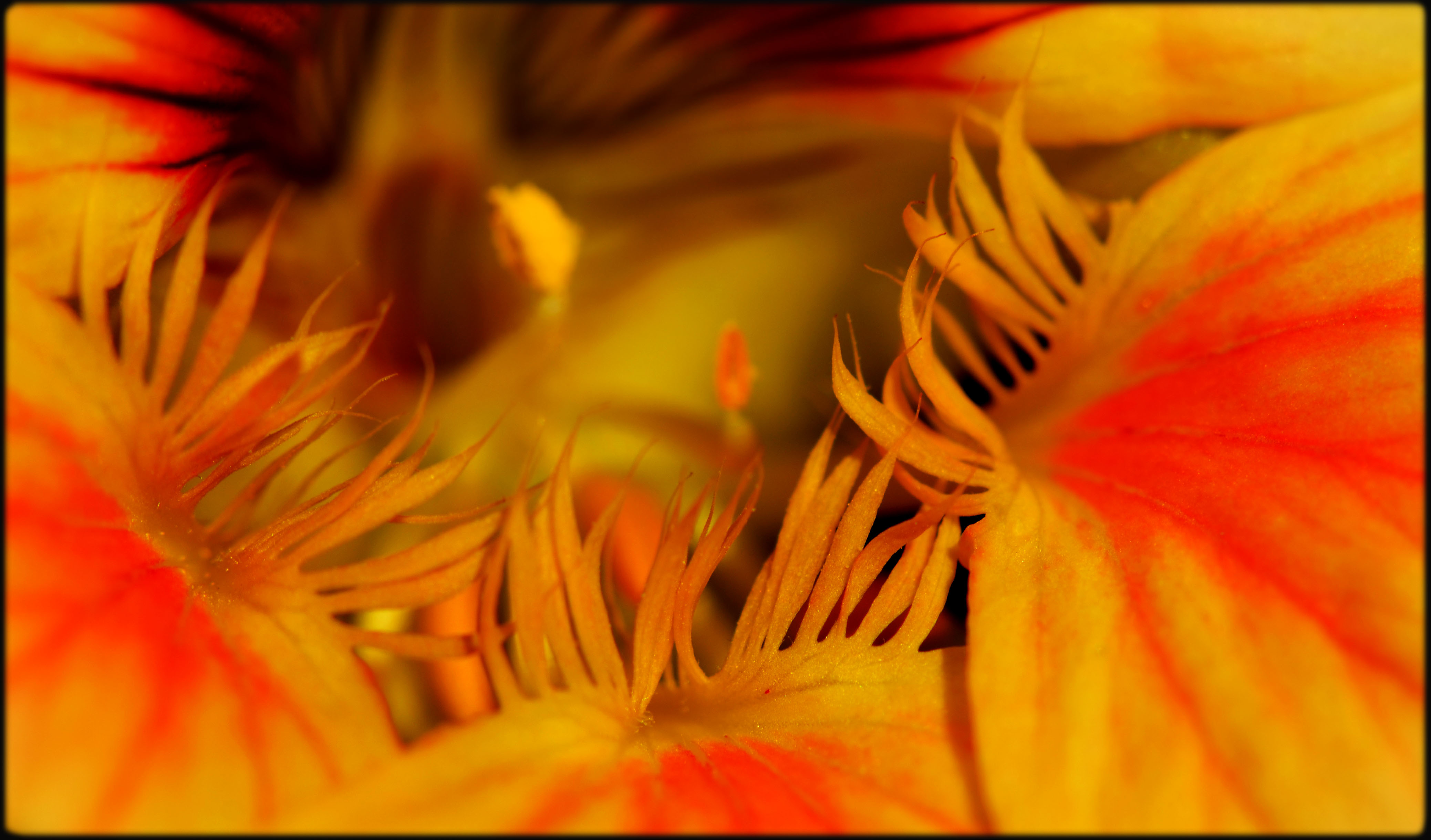 Capucine photographiée près de Lille (Nord de la France)